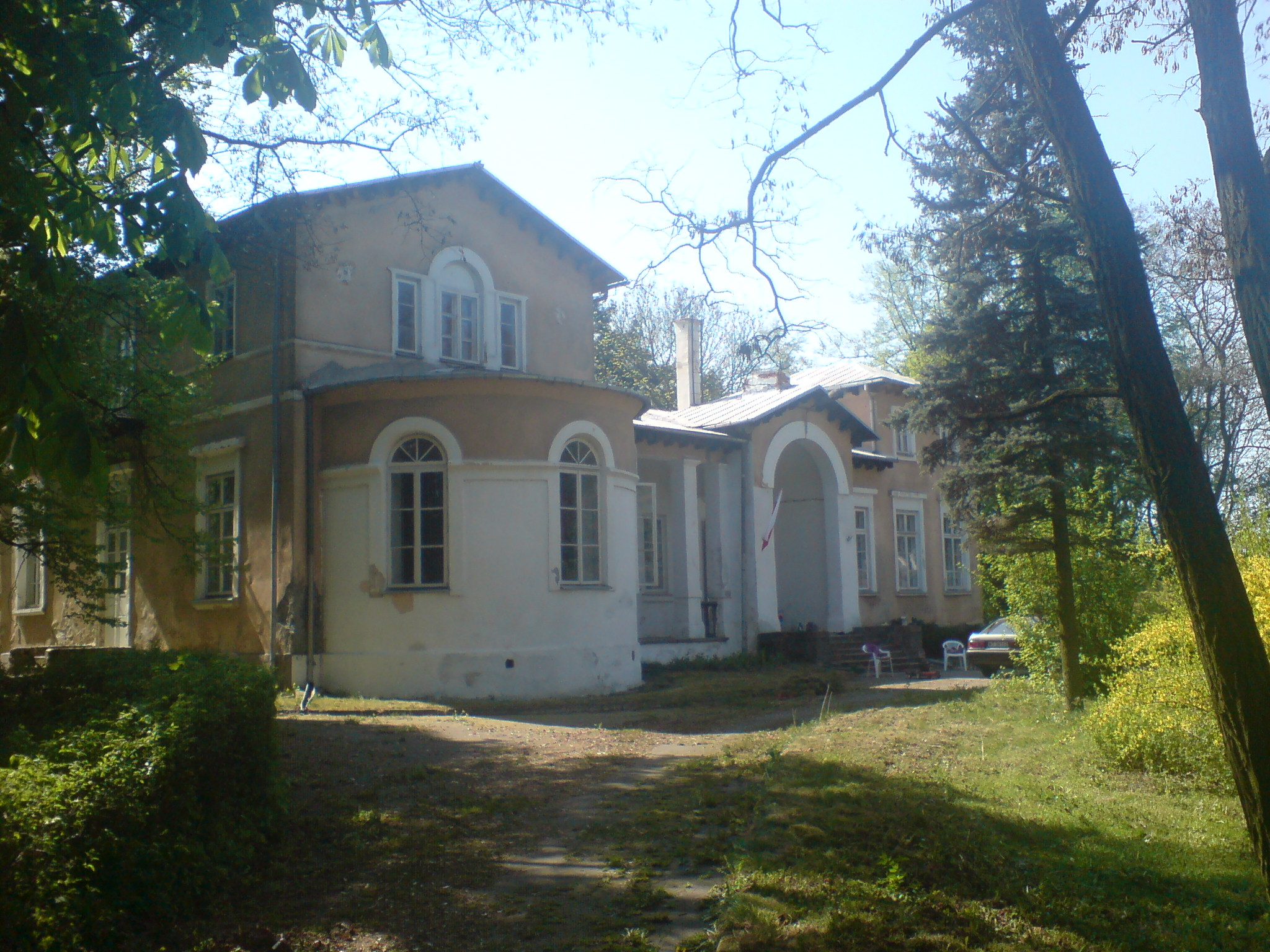 Koroszczyn - zespół dworski (ok. 1870): dwór (zabytek nr A/685 z 30.11.1973 and 31.12.1983)